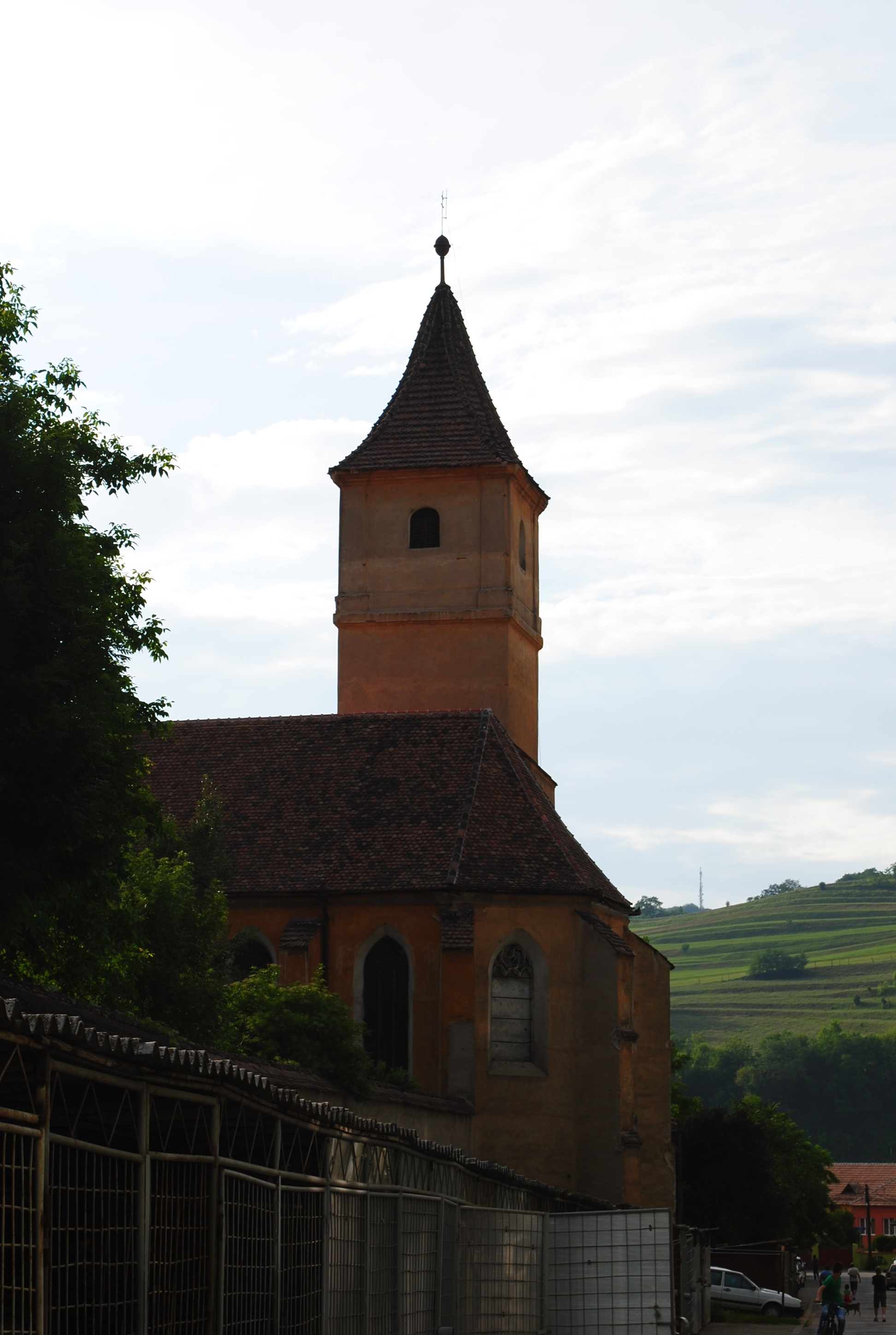 Biserica romano-catolică "Imaculata Concepțiune" 1490-1515, 1742 01